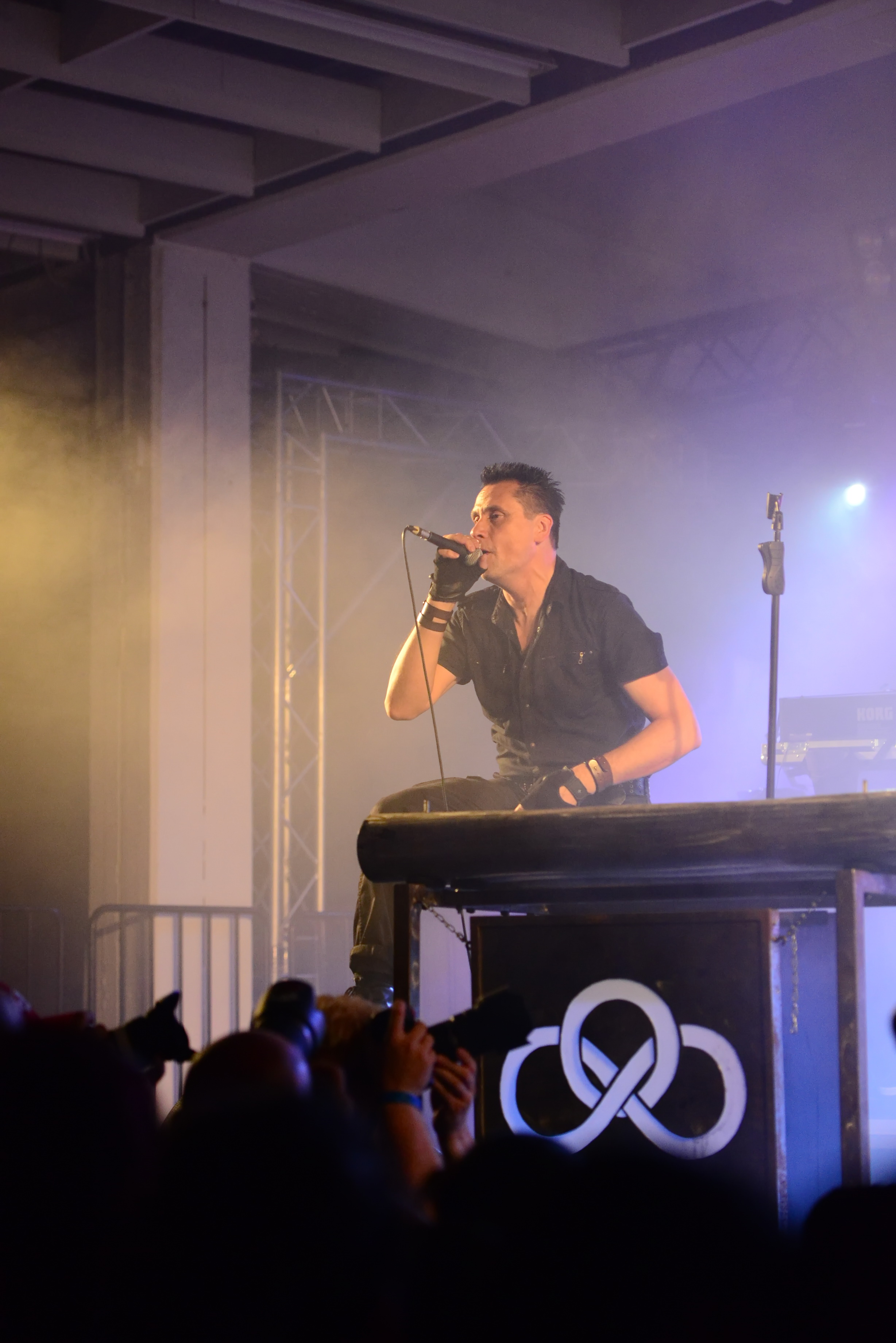 Die Krupps, Amphi festival 2014